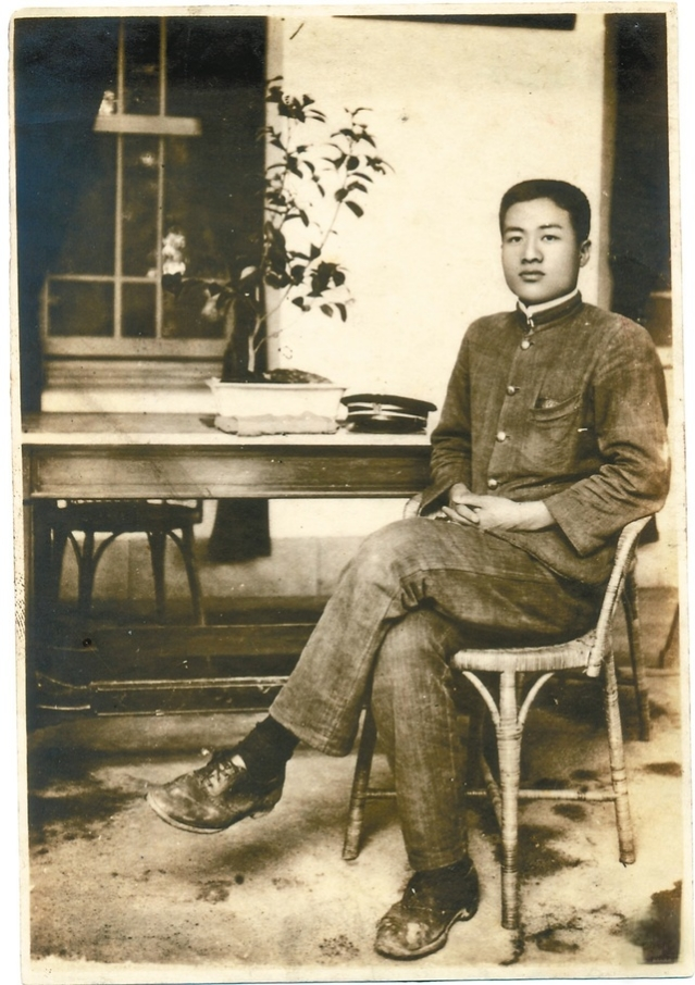 學生時期蔣渭水